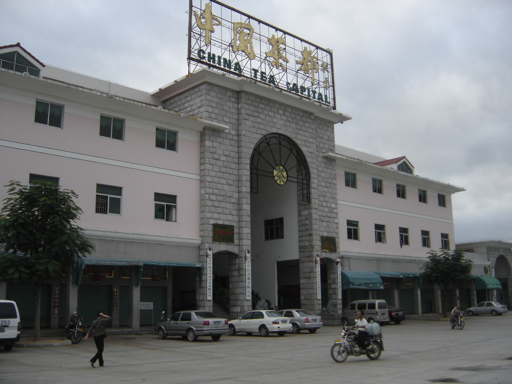 自拍